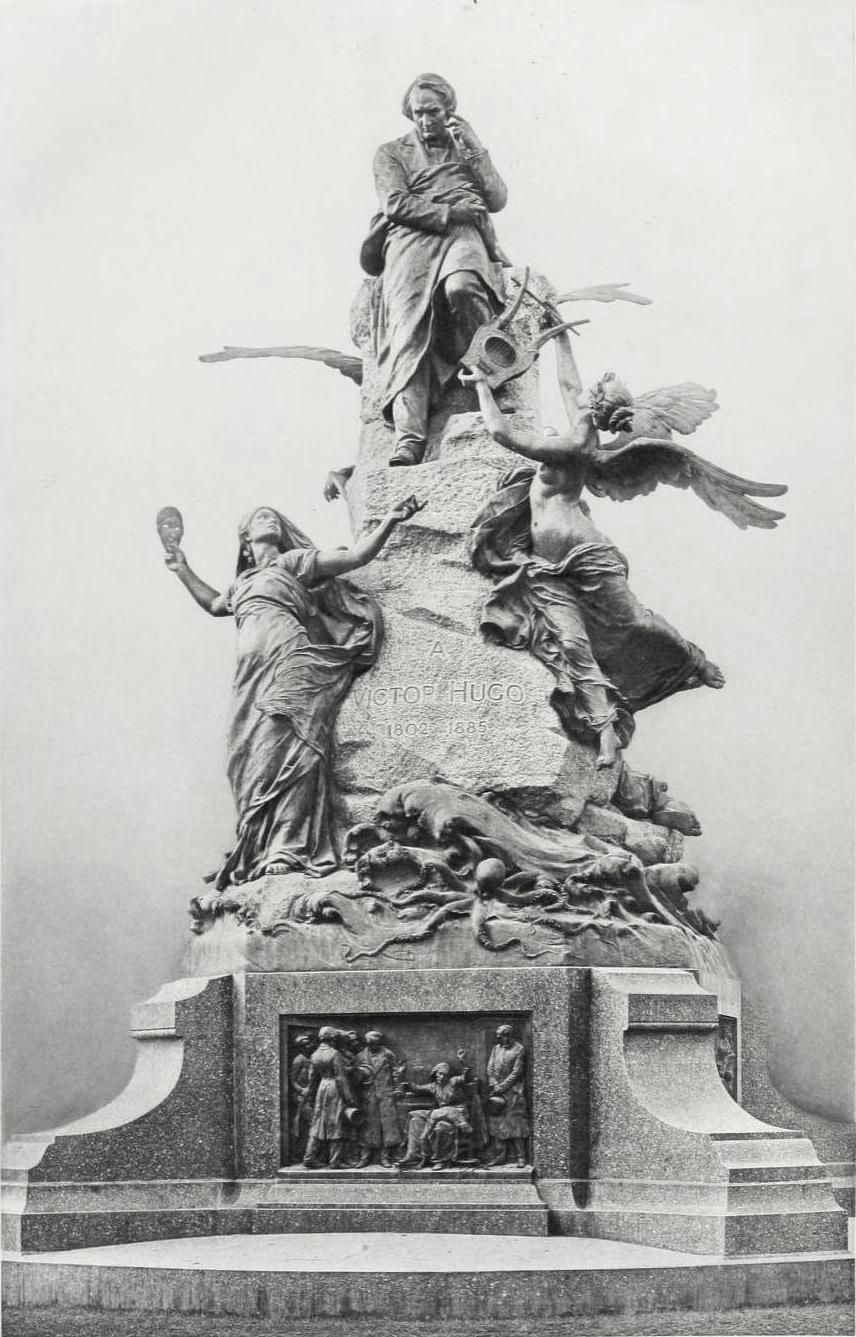 "Monument érigé par souscription nationale, place Victor-Hugo (face)".